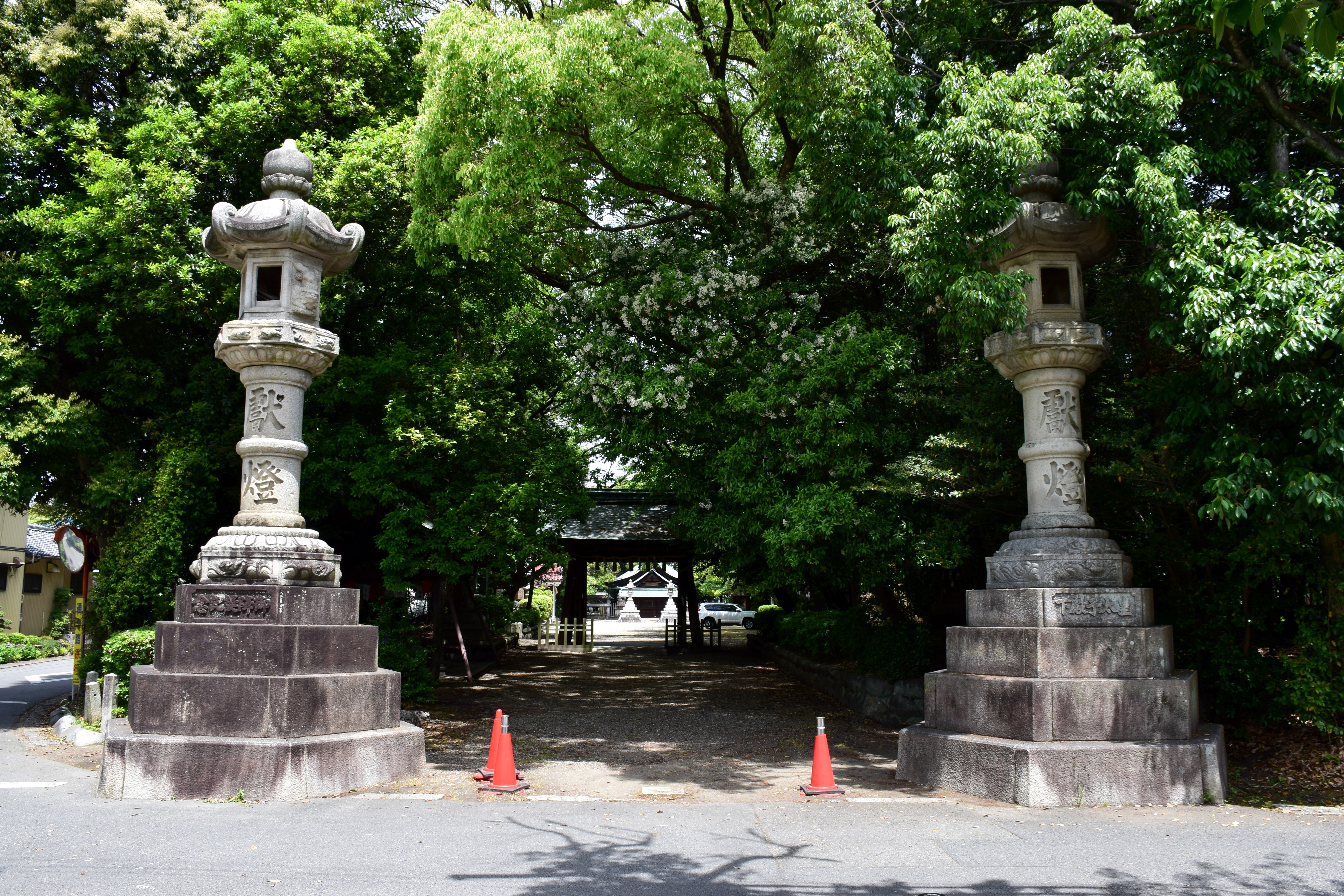 伊多波刀神社の灯籠